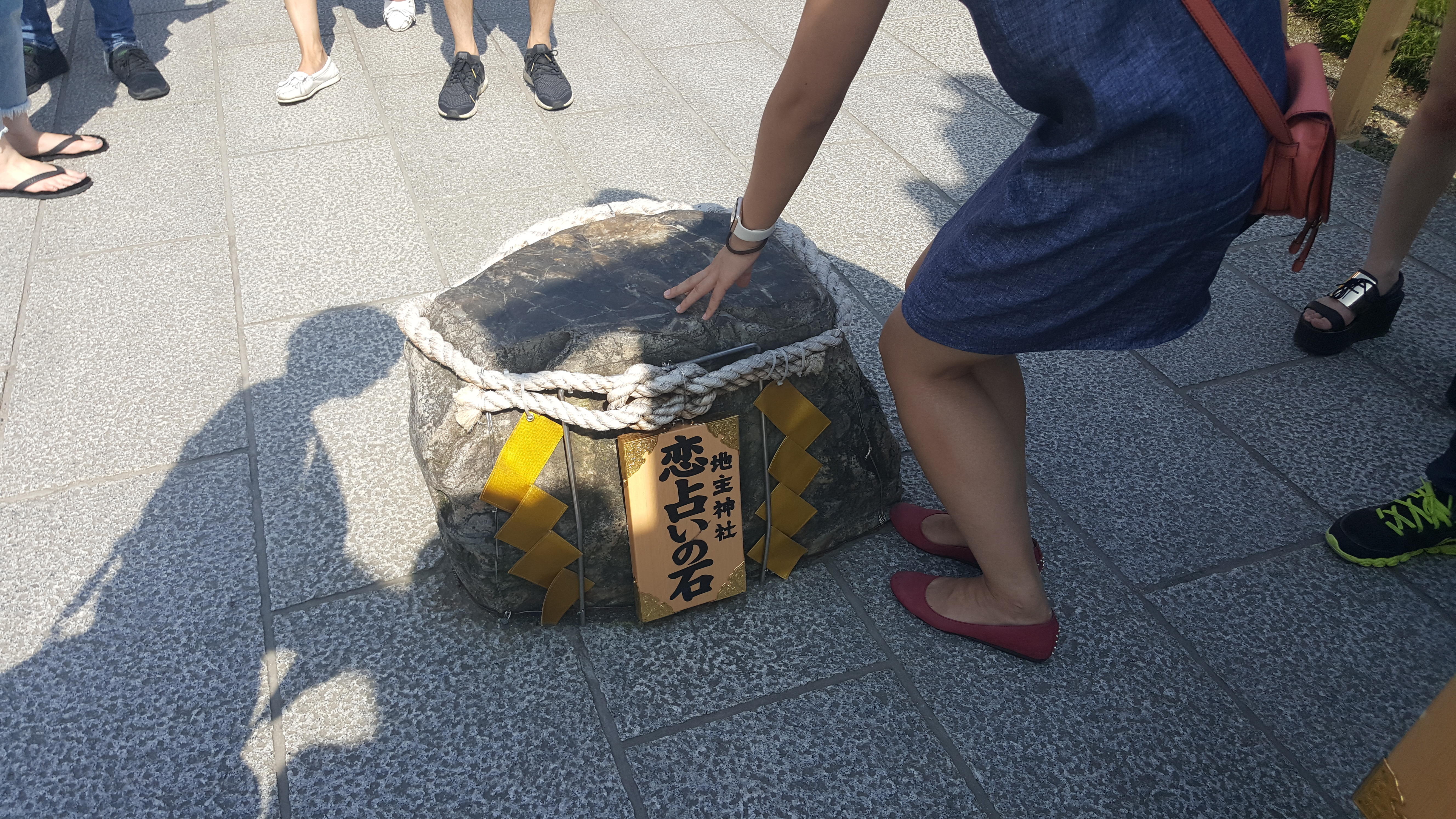 2016년 6월 교토 기요미즈데라 내부에 있는 짓슈 신사의 러브 스톤